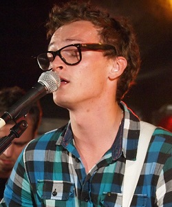 Goran Gora Positivus festivālā 2011